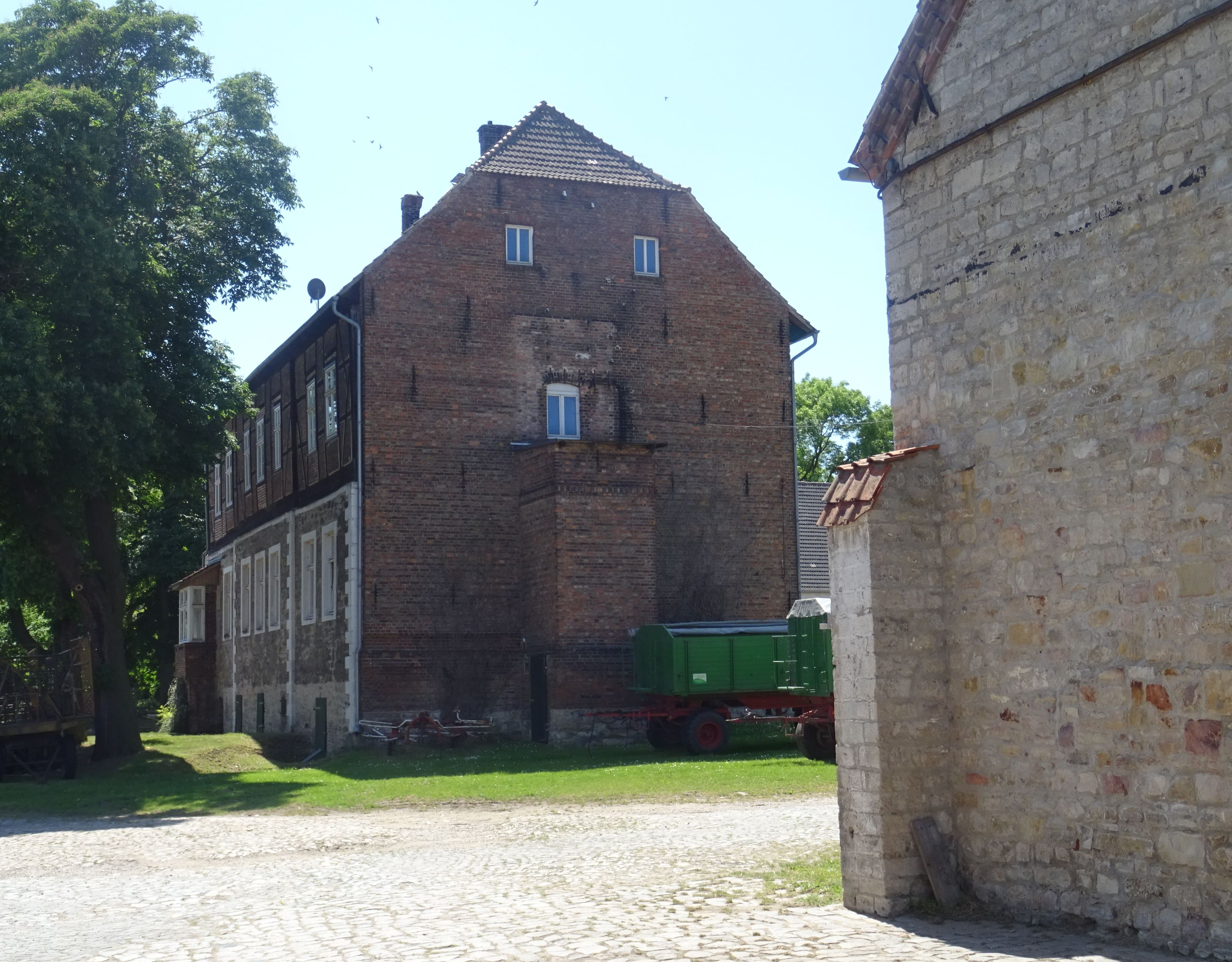 Domäne Neuwegersleben, denkmalgeschützt, Hof